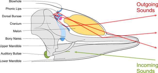 Schematic diagram of sound production and reception in a toothed whale, drawn using XaraXtreme by Emoscopes 06:07, 14 January 2006 (UTC) diagrama esquematico de la produccion y recepcion de sonido en una ballena dentada, dibujado con XaraXtreme por Emoscopes 06:07, 14 January 2006 (UTC)